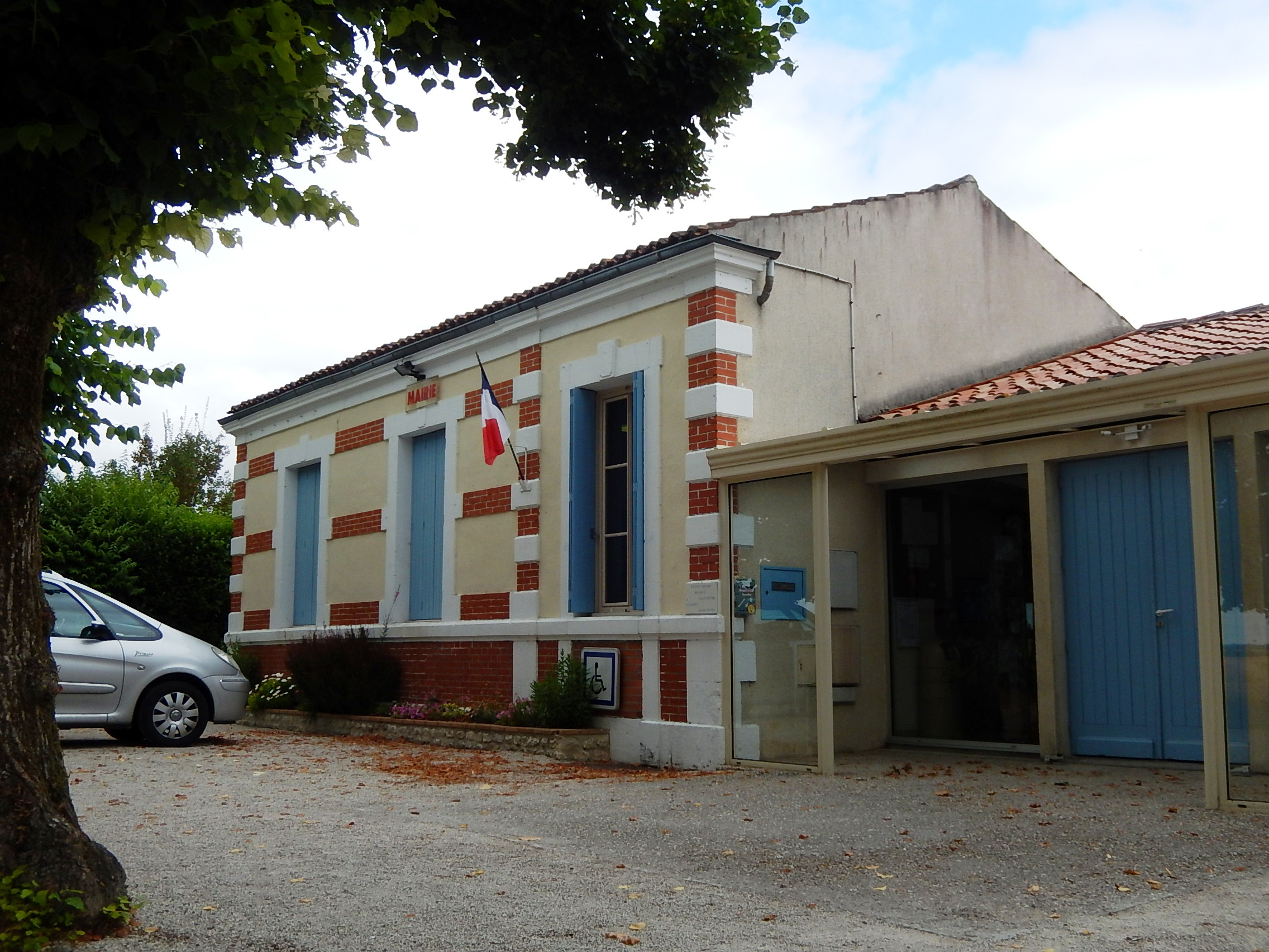 Le bâtiment abritant la mairie d'Antezant-la-Chapelle, à Antezant.